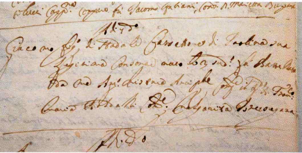 Atto di battesimo di Giacomo Cassetti, tratto dall'archivio parrocchiale di Sambruson. Interpretazione del testo: "Giacomo figlio di Natale Cassetti e di Paolina sua leggittima consorte, nato il 3 maggio: fu battezzato da me Antonio Mistura arciprete compare il sig. Francesco Maria Dittadi e comare Malgarita Brusegan". (fonte: Luigi Zampieri (a cura di), Giacomo Cassetti, Sambrusonlastoria.it)